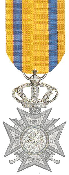 Eugen tekening Robert Prummel